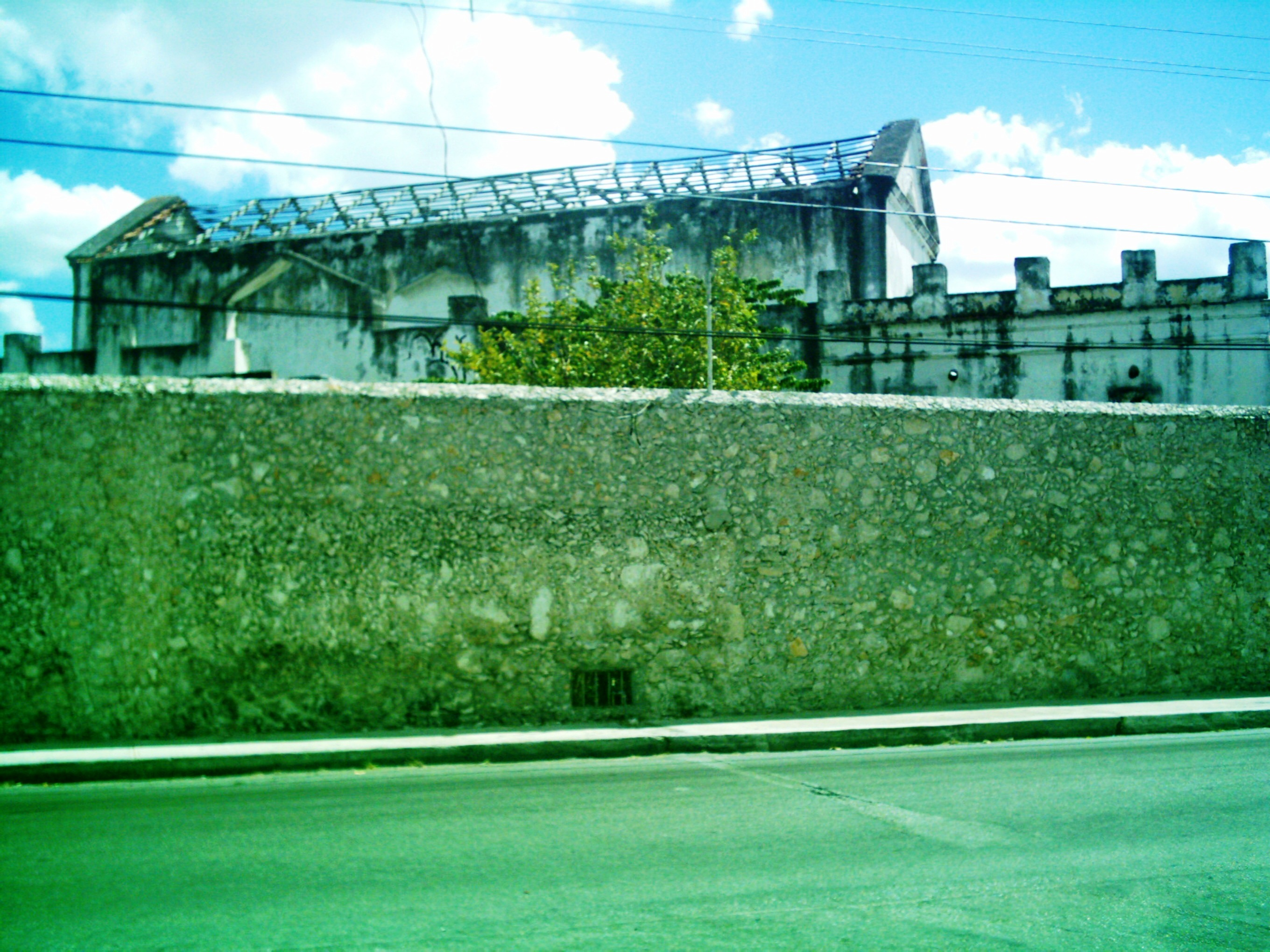 Hacienda San Diego Azcorra, Yucatán.